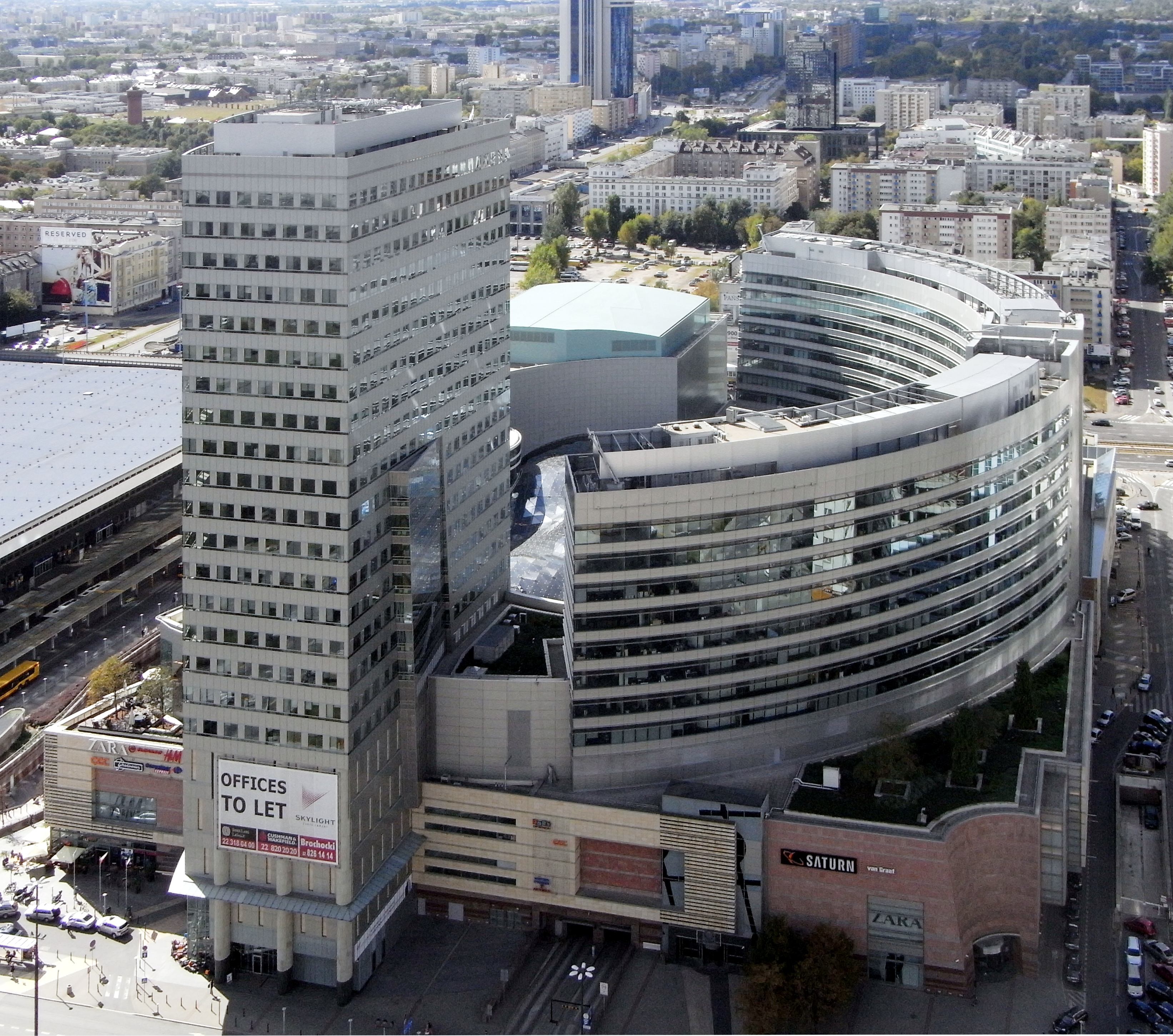 Warschau, Blick auf die "Goldenen Terrassen" vom Kulturpalast aus.